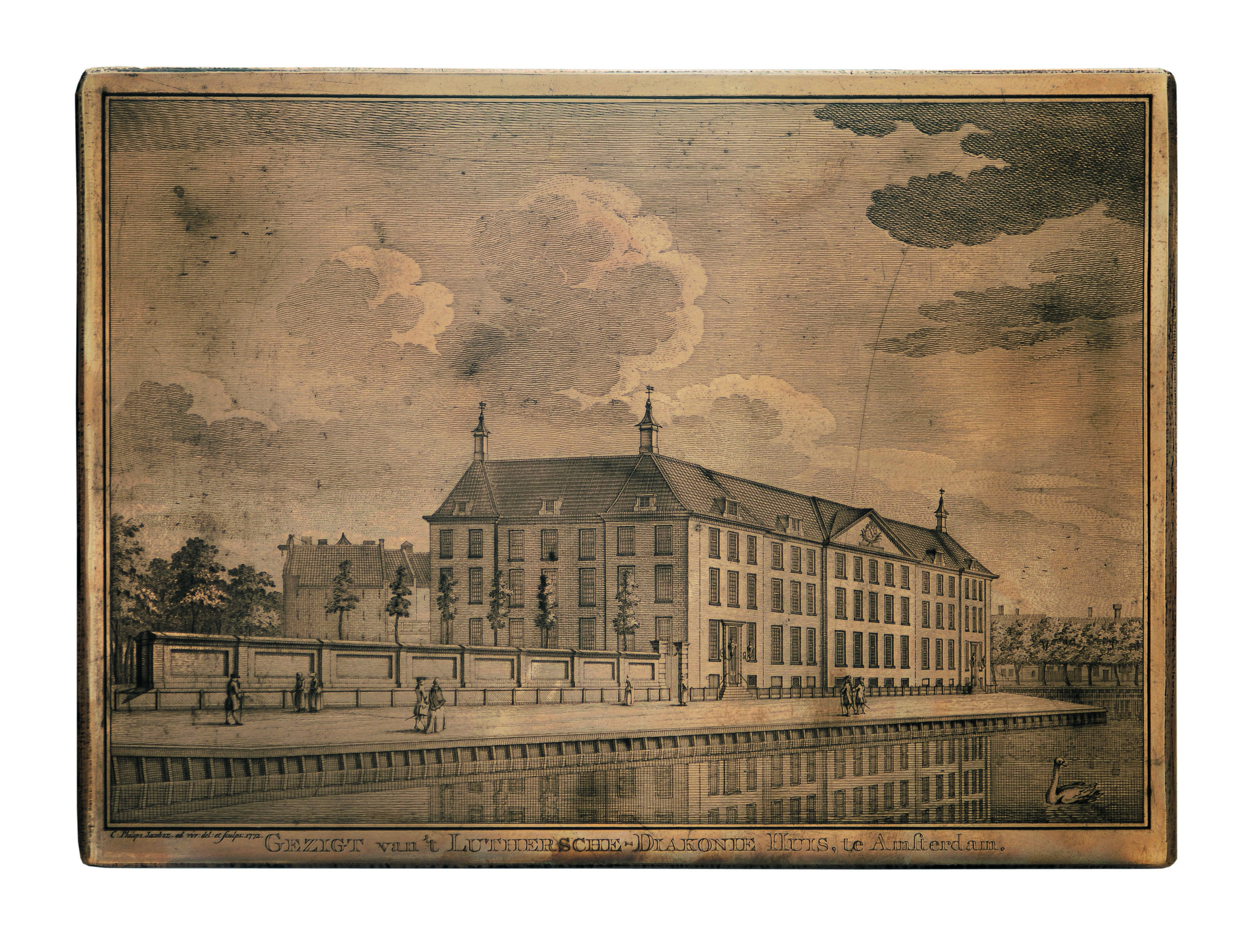 Etsplaat van het ELOMVH